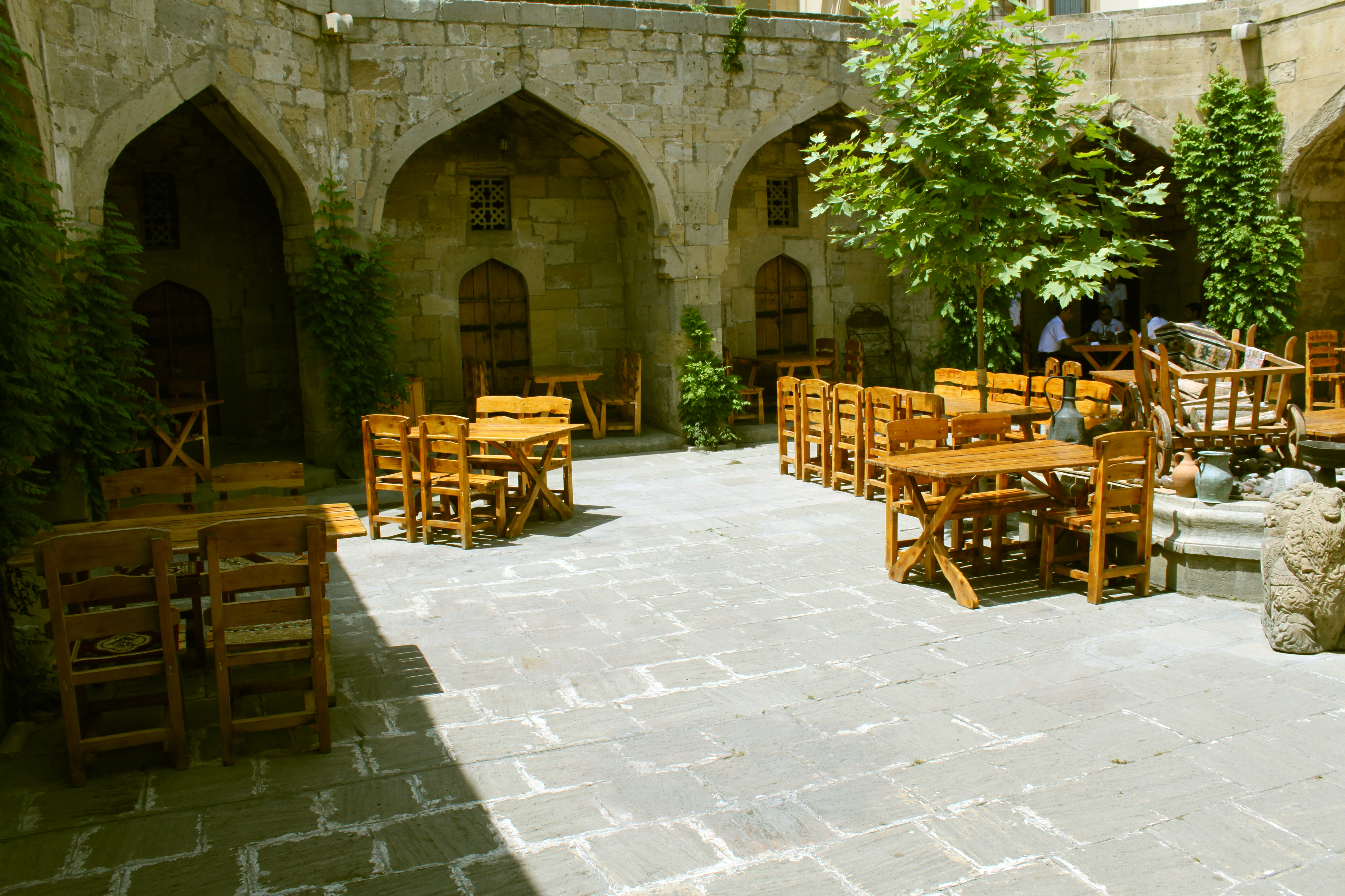 Multani karvansarayı